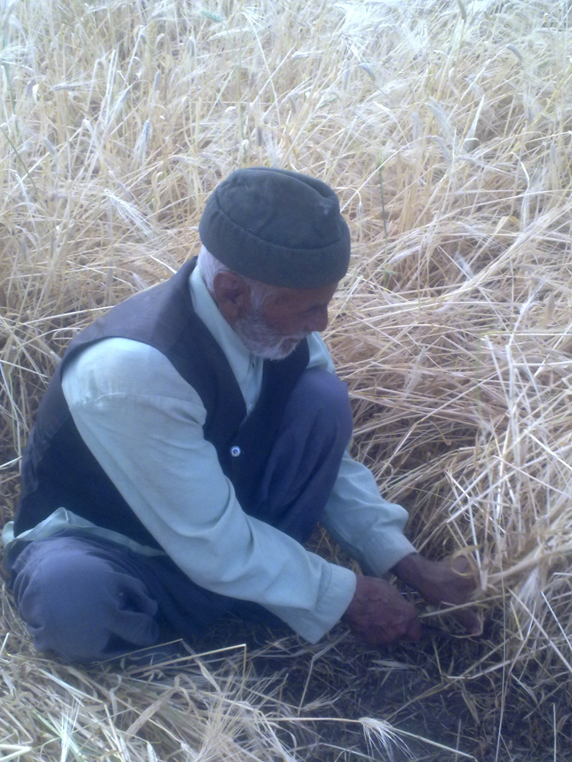 کشاورز روستای کلاته سلطانی